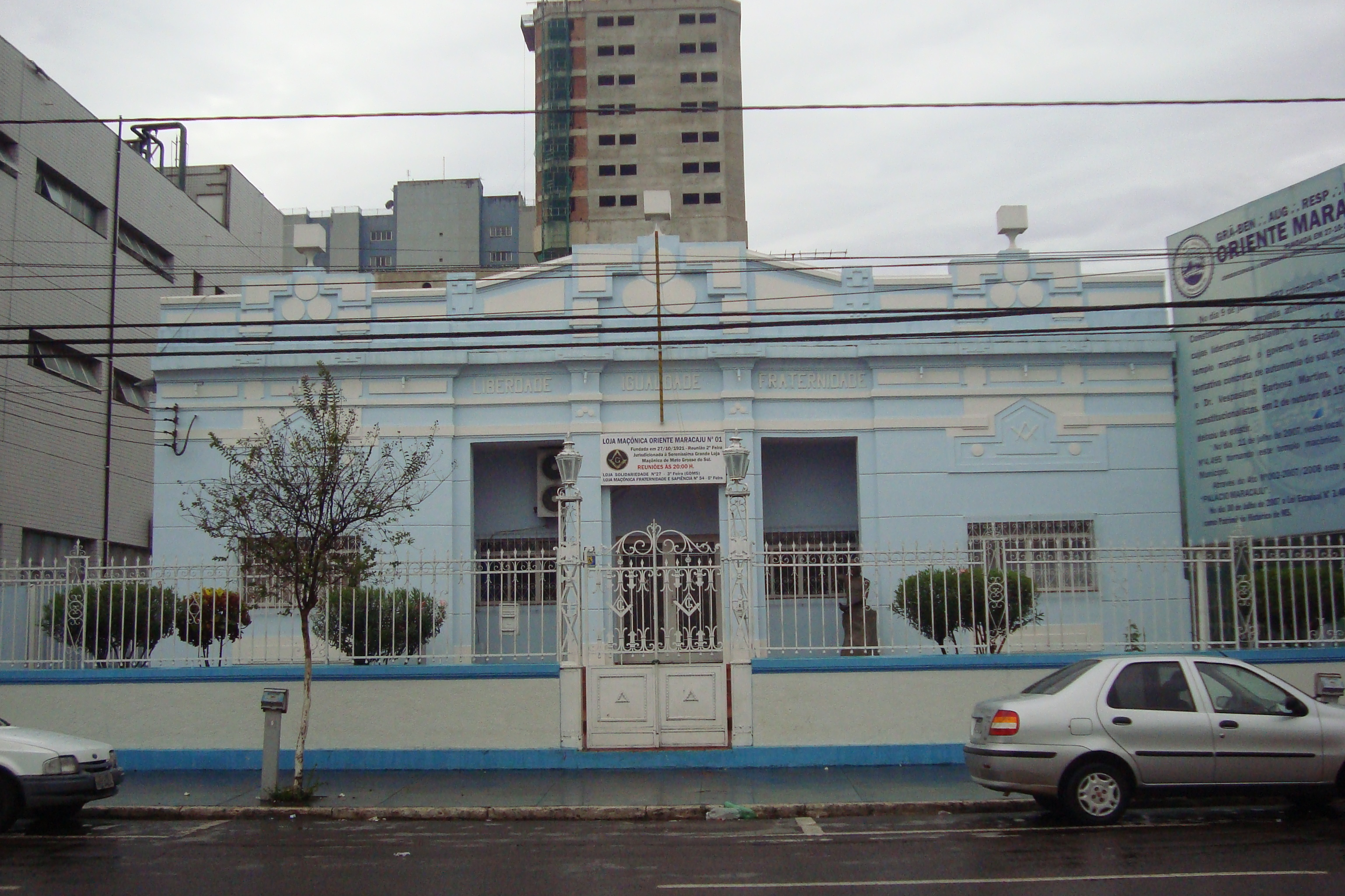 Vista do Palácio Maracaju, sede do Estado de Maracaju durante a revolução Constitucionalista de 1932, localizado em Campo Grande, MS, Brasil